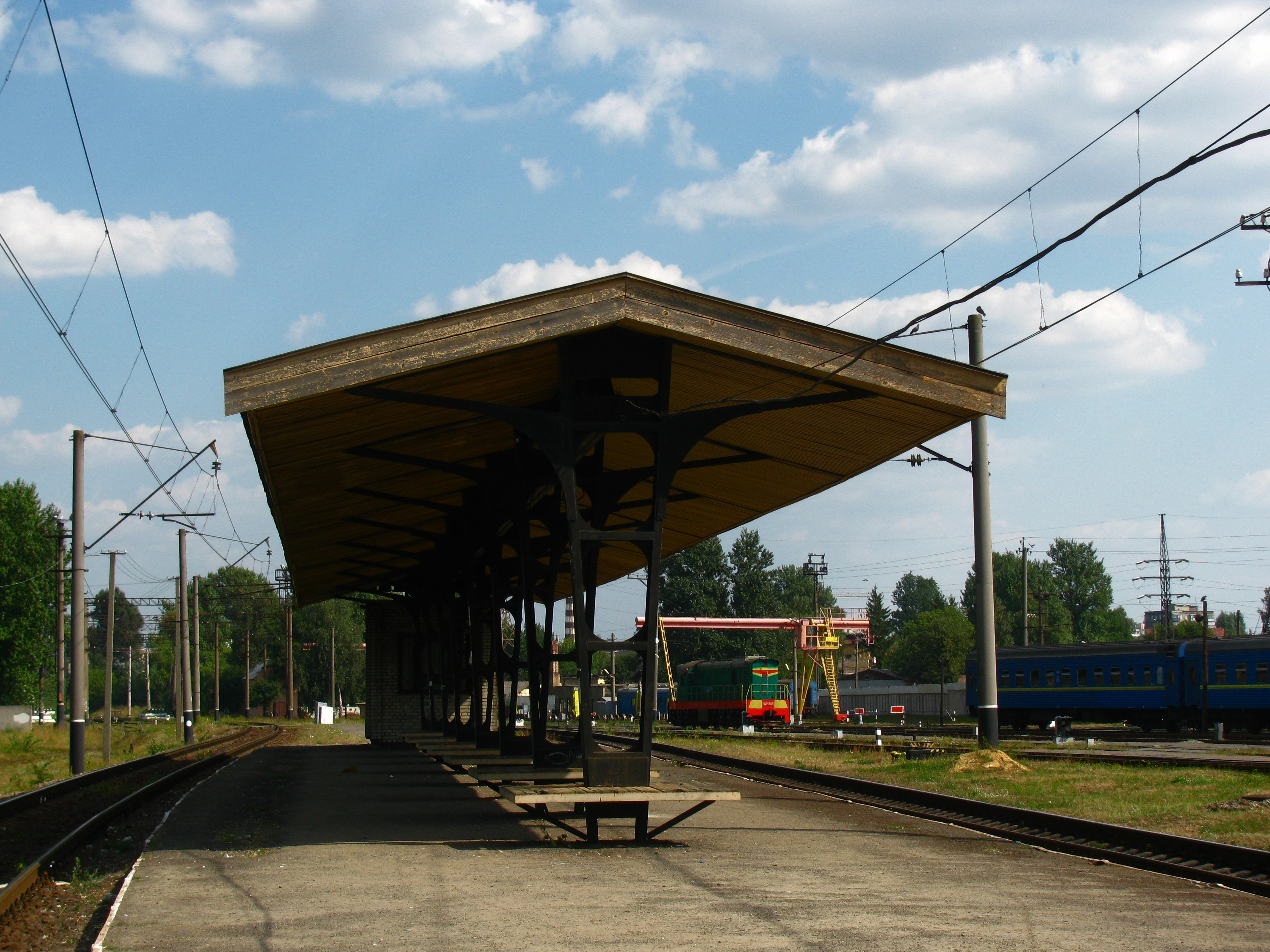 Зупинний пункт "5-ий парк" у Львові поблизу Левандівки на території Пасажирського вагонного депо "Львів"